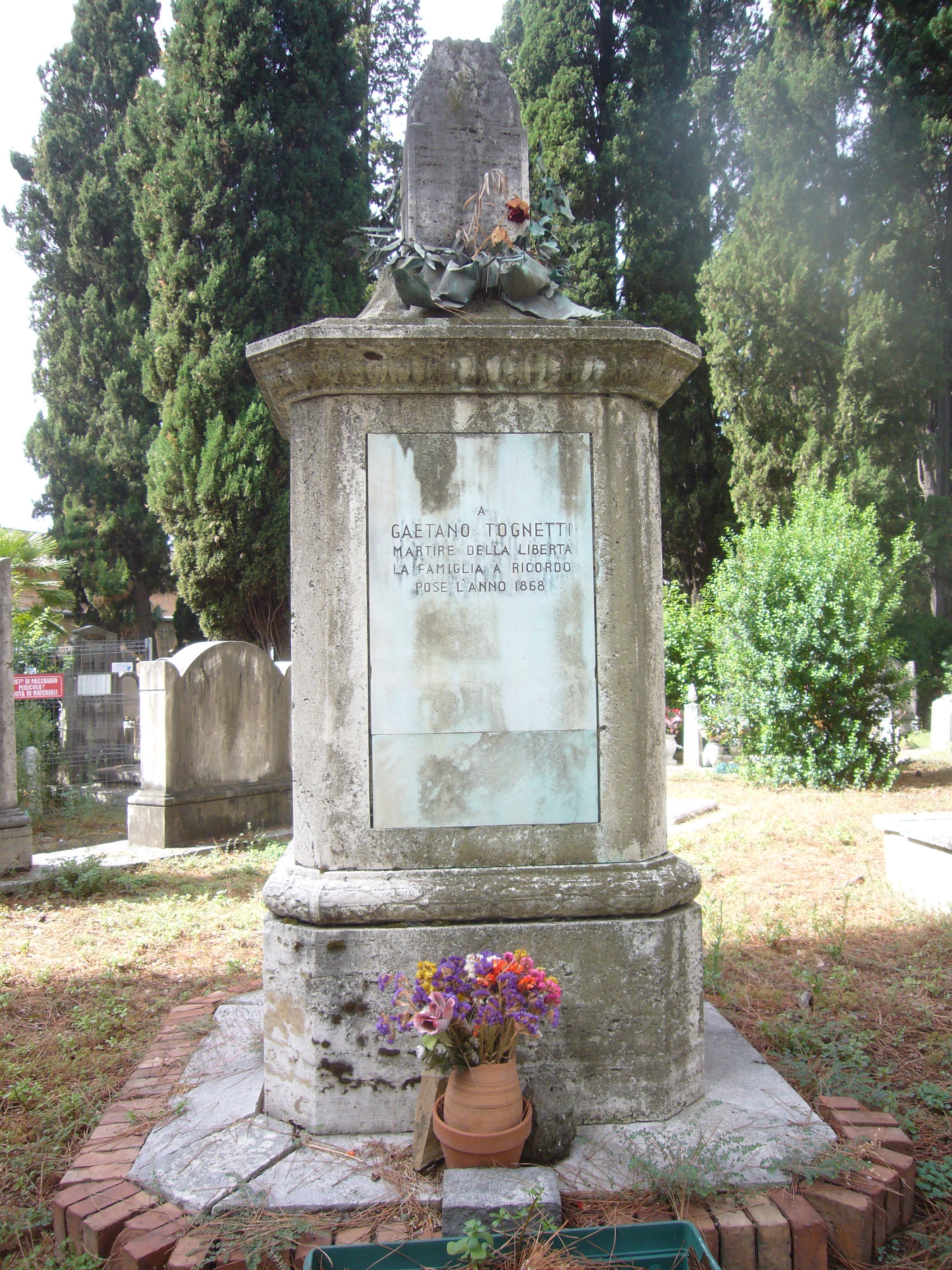 Roma, cimitero del Verano. Monumento a gaetano Tognetti al Pincetto vecchio. La data 1868 è quella dell'esecuzione capitale voluta da Pio IX. Il monumento fu fatto realizzare dalla famiglia dopo il 1870.